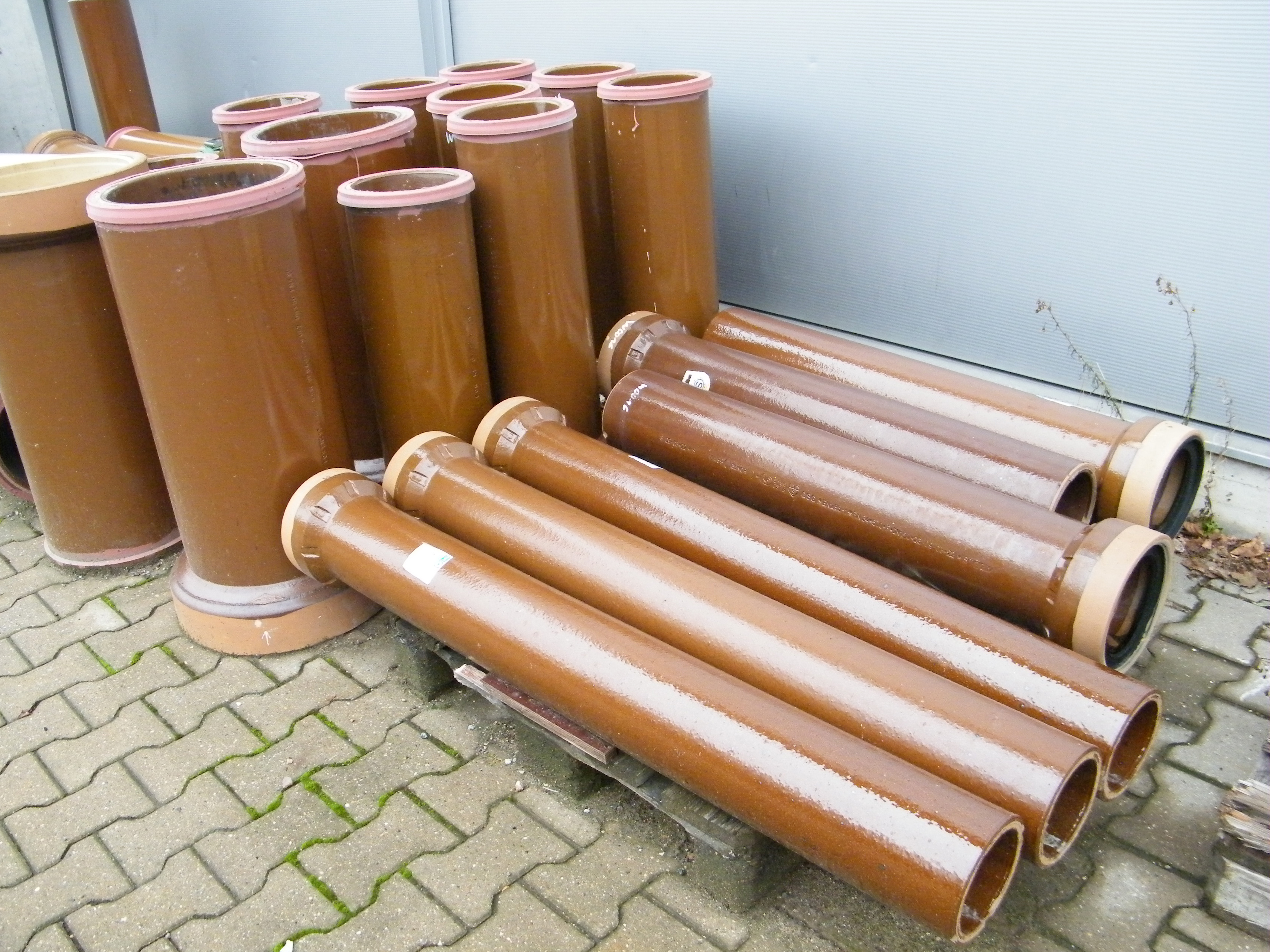 Die Abbildung zeigt einige Abwasserrohre aus Keramik in unterschiedlicher Nennweite.